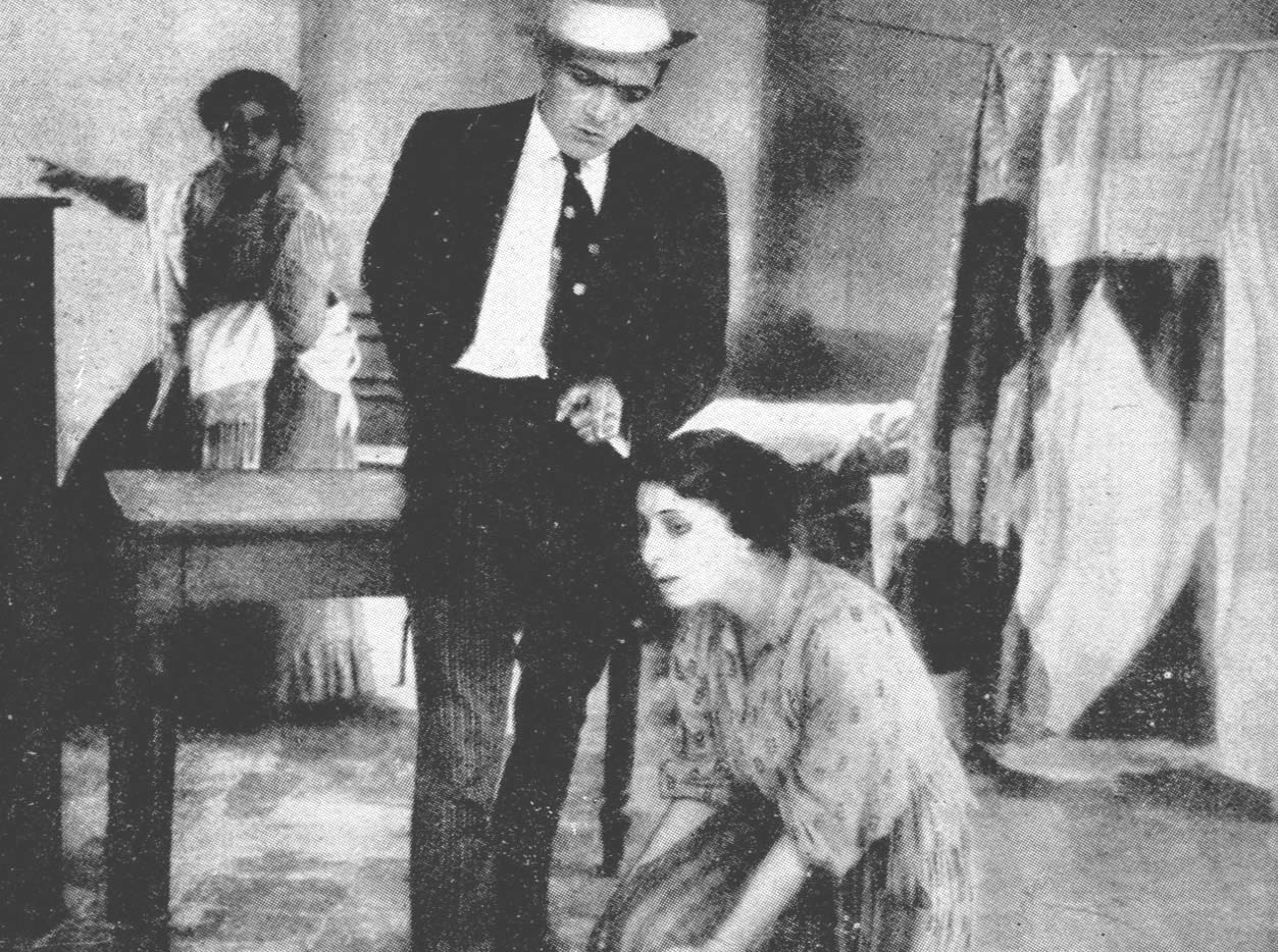 Sperduti nel buio (Martoglio, 1914) - foto scena